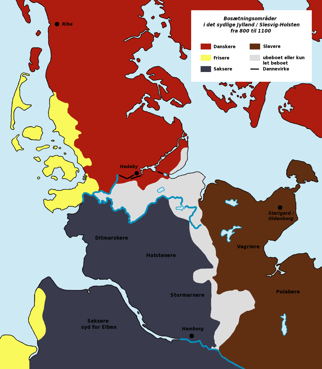 Bosætningsområder i det sydlige Jylland / Slesvig-Holsten fra omtrent 800 til 1100, kilder: 1) "Siedlungsgebiete vom 9. bis 11. Jahrhundert" i: Historischer Atlas Schleswig-Holstein vom Mittelalter bis 1867, Neumünster 2004. 2) Peter Ilsøe: Nordens Historie, København 1936 (med tekst og Dannevirke)